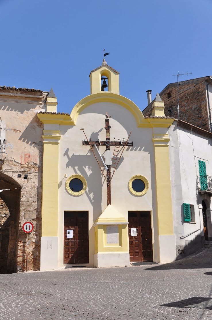 Penne (comune, Italy) 2012